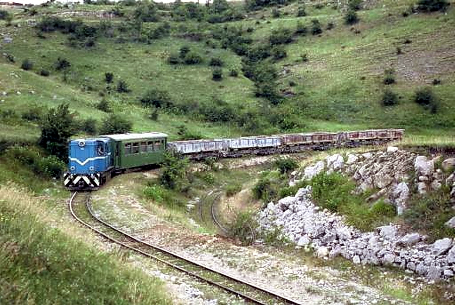 Tren pe linia ferată îngustă industrială Sănduleşti-Turda, care transporta calcar la Fabrica de Ciment.